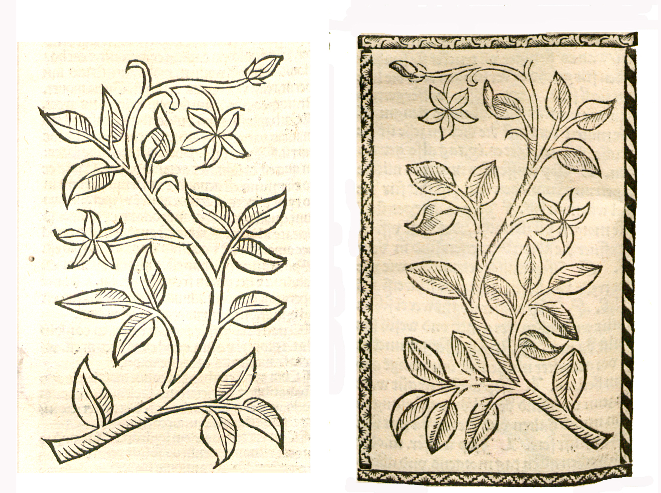 Abbildung von Ingrüen (Vinca minor)